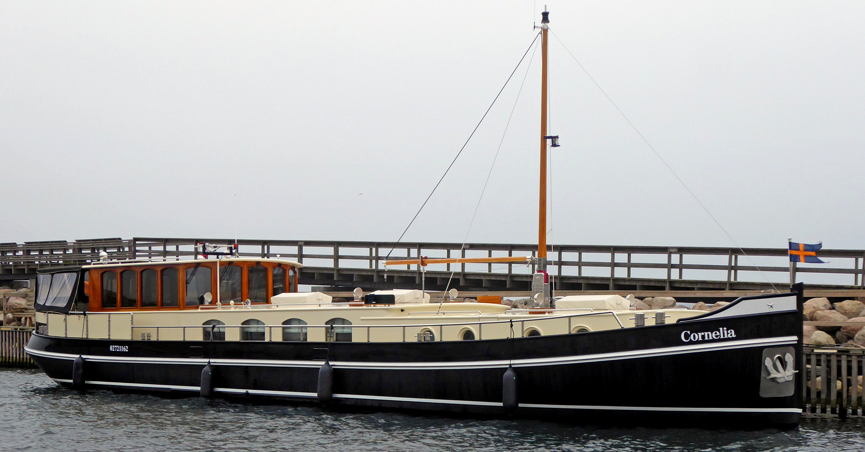 Husbåten Cornelia från Stockholm ligger i Ystads småbåtshamn 10 nov 2018.